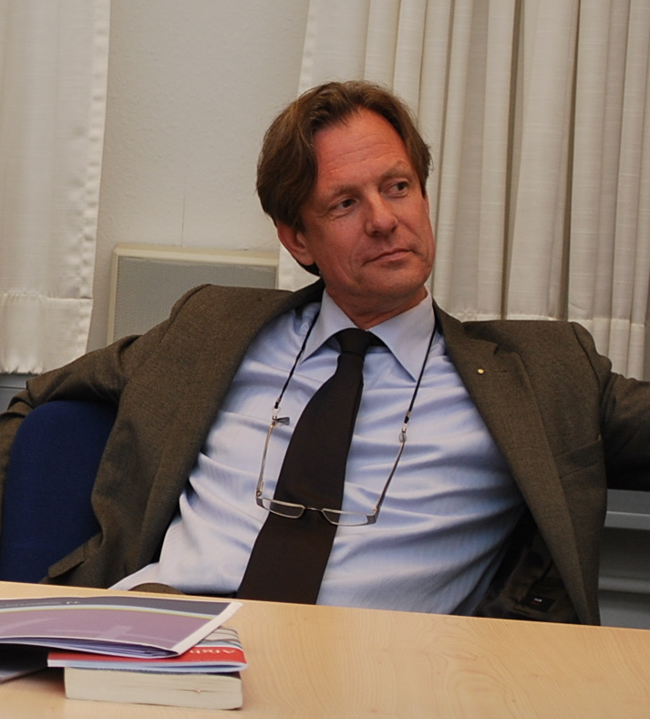 Pastor Jörn Thießen, ehemaliger Bundestagsabgeordneter